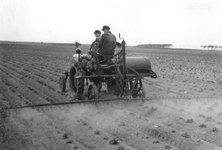 MTS Wolkenitz, Kartoffelkäferbekämpfung Zentralbild Siegert 5.6.1953 Wirksame Kartoffelkäferbekämpfung sichert die Ernte. Der Kartoffelkäfer mit seinen Larven und Eigelegen ist in den letzten Jahren so stark aufgetreten, daß er eine ernste Gefahr für den gesamten Kartoffelanbau und damit für die Versorgung unserer Bevölkerung darstellt. Deshalb führen die Kollegen der MTS Wolkenitz, Kreis Riesa, die Kartoffenkäferbekämpfung gemäss der Verordnung des Ministerrates umfassend durch. Mit einer Schaumnebelspritze PSN 6, die von einem sowjetischen Geräteträger gezogen wird, rückt man den Schädlingen zu Leibe. Der 16-jährige Traktorist Fritz Krönert, einer der Besten der Station, bearbeitet so täglich durchschnittlich 15 Hektar.